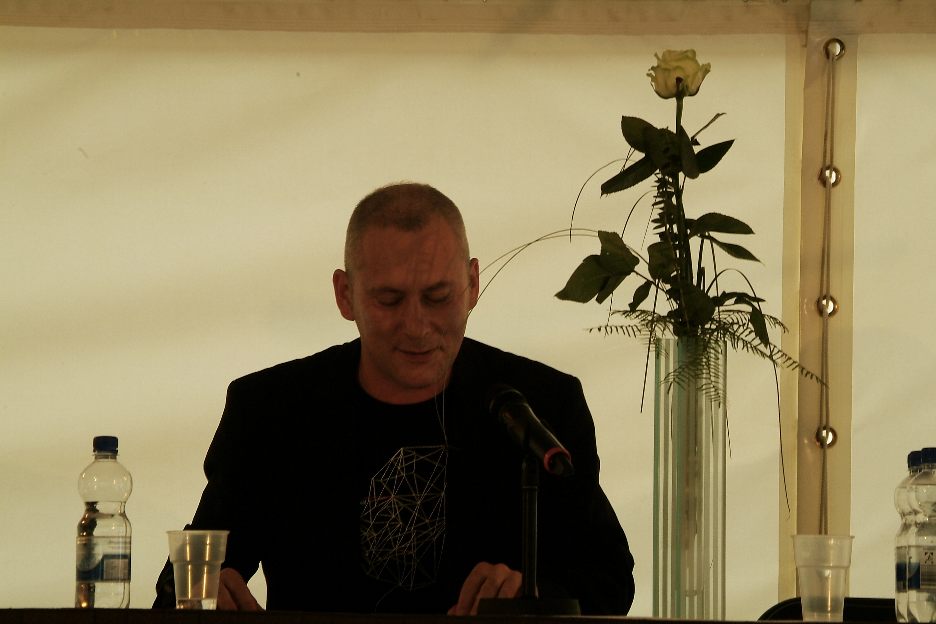 Gedenkveranstaltung zum 79. Jahrestag der Bücherverbrennungen in Hannover. Unter der Erkenntnis "... dort, wo man Bücher verbrennt, verbrennt man am Ende auch Menschen" fanden durch die Inititative "Hannover im Wort" verschiedene Veranstaltungen statt, darunter die am Opernplatz mit Lesungen verfolgter Autoren bzw. von Ihnen verbrannter Bücher.